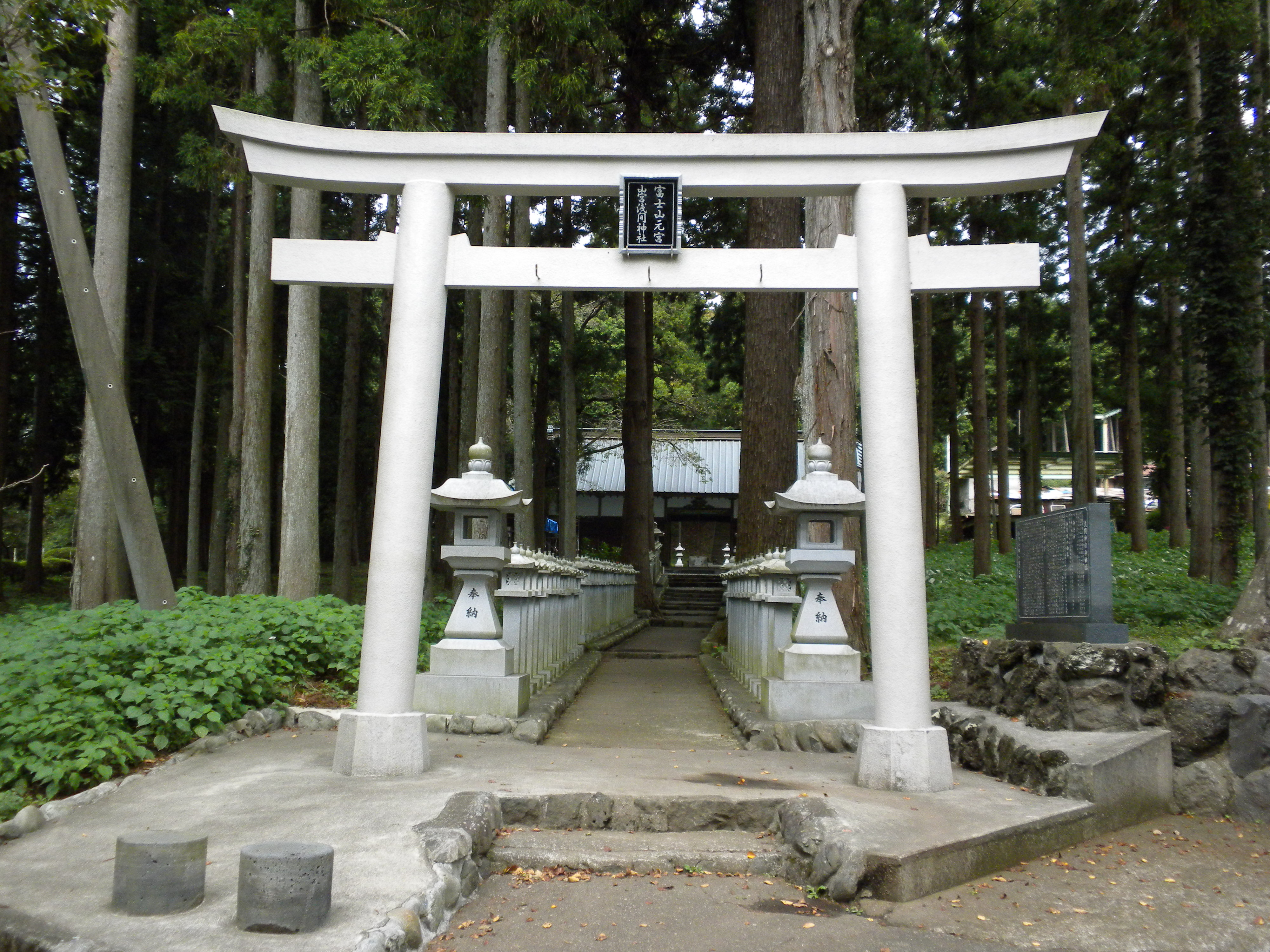 山宮浅間神社